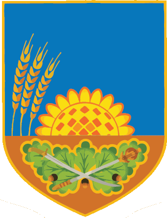 Герб Широківського району